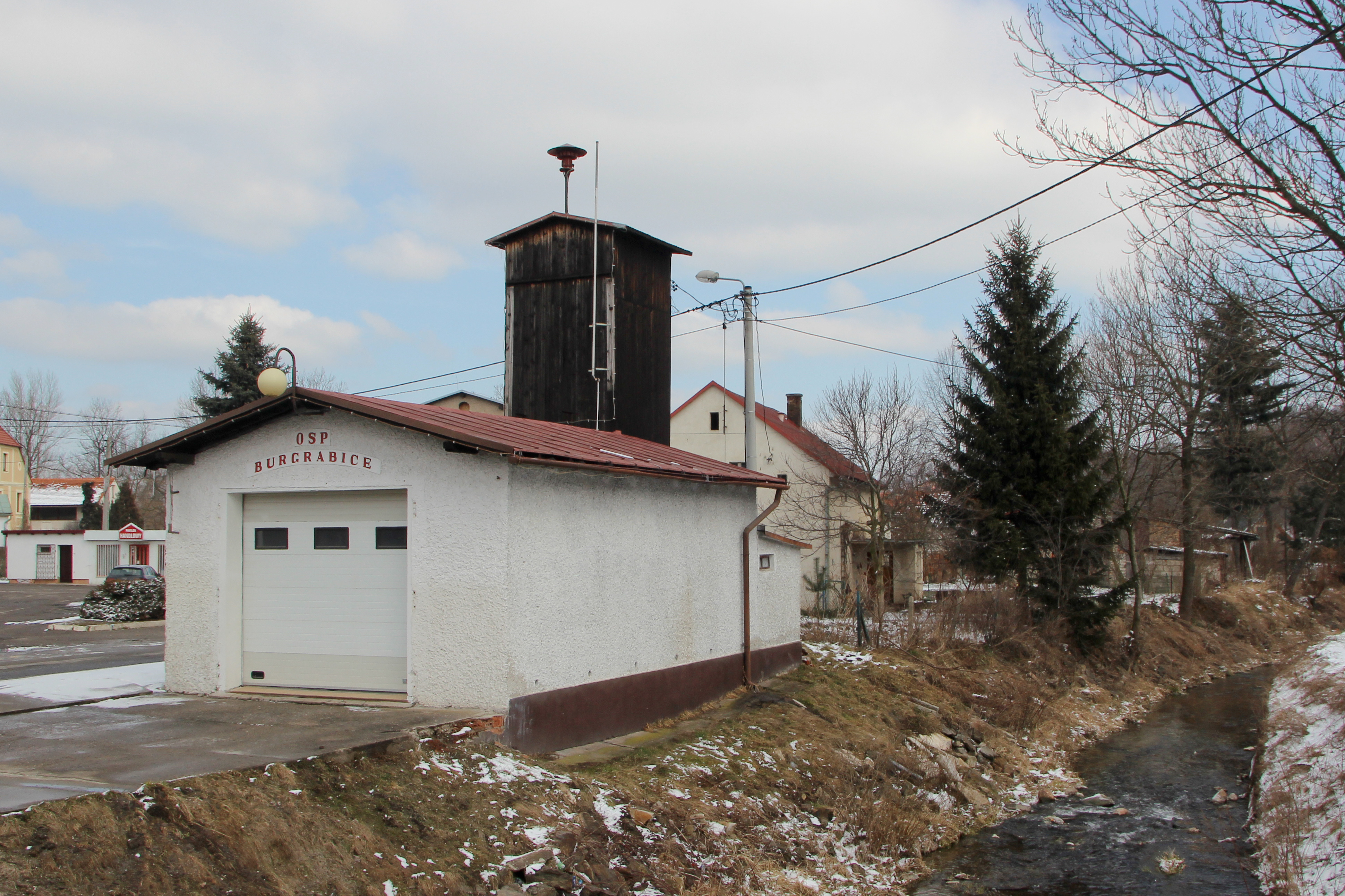 Burgrabice – Ochotnicza Straż Pożarna